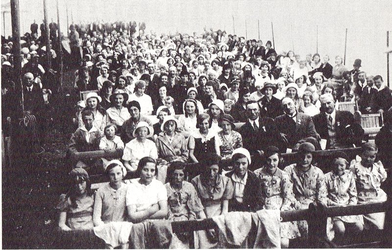 Eisteddfod en Rhymni - Dolavon - 1933 (Foto Stillitani)